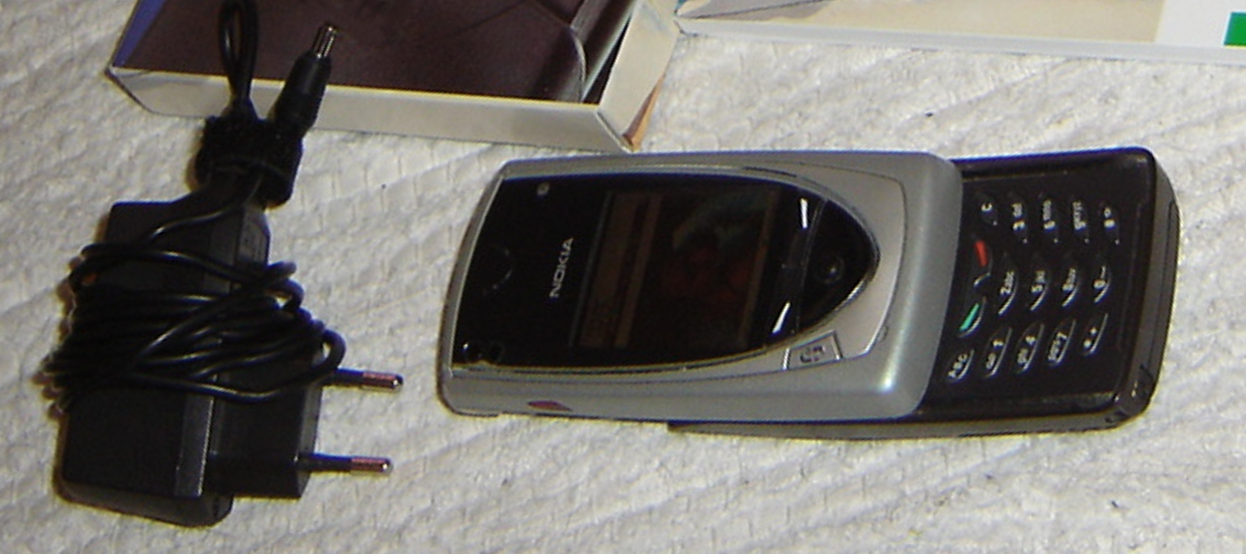 Nokia 7650 Fotohandy mit Ladegerät, Deutschland